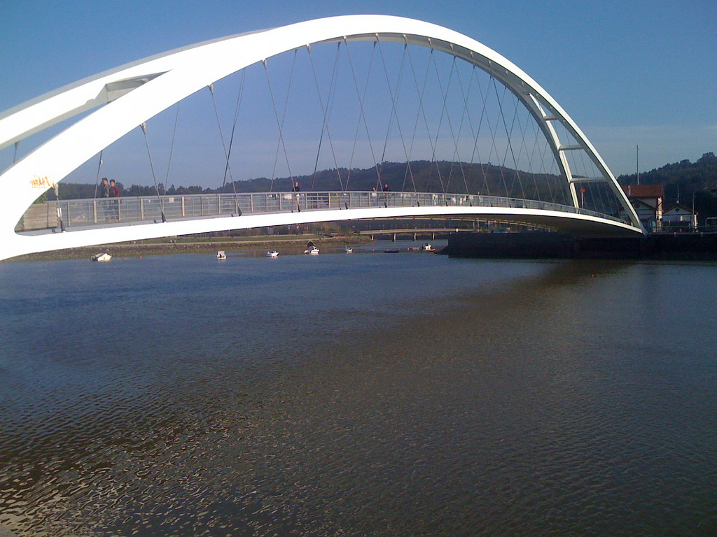 Plentzia, Vizcaya, Basque country, Spain